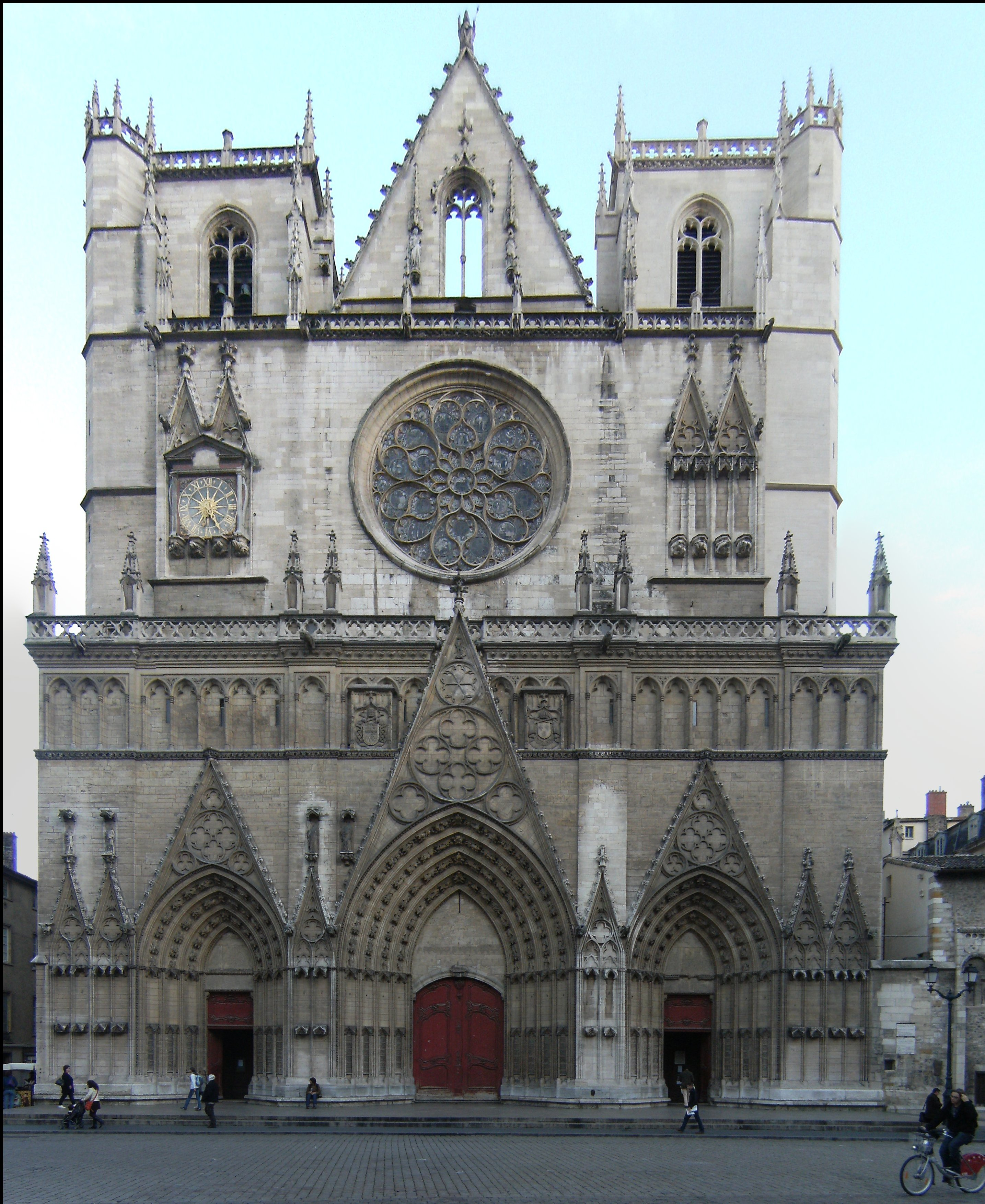 La cathédrale Saint Jean à Lyon – À partir de quatre photos fusionnées avec Hugin.